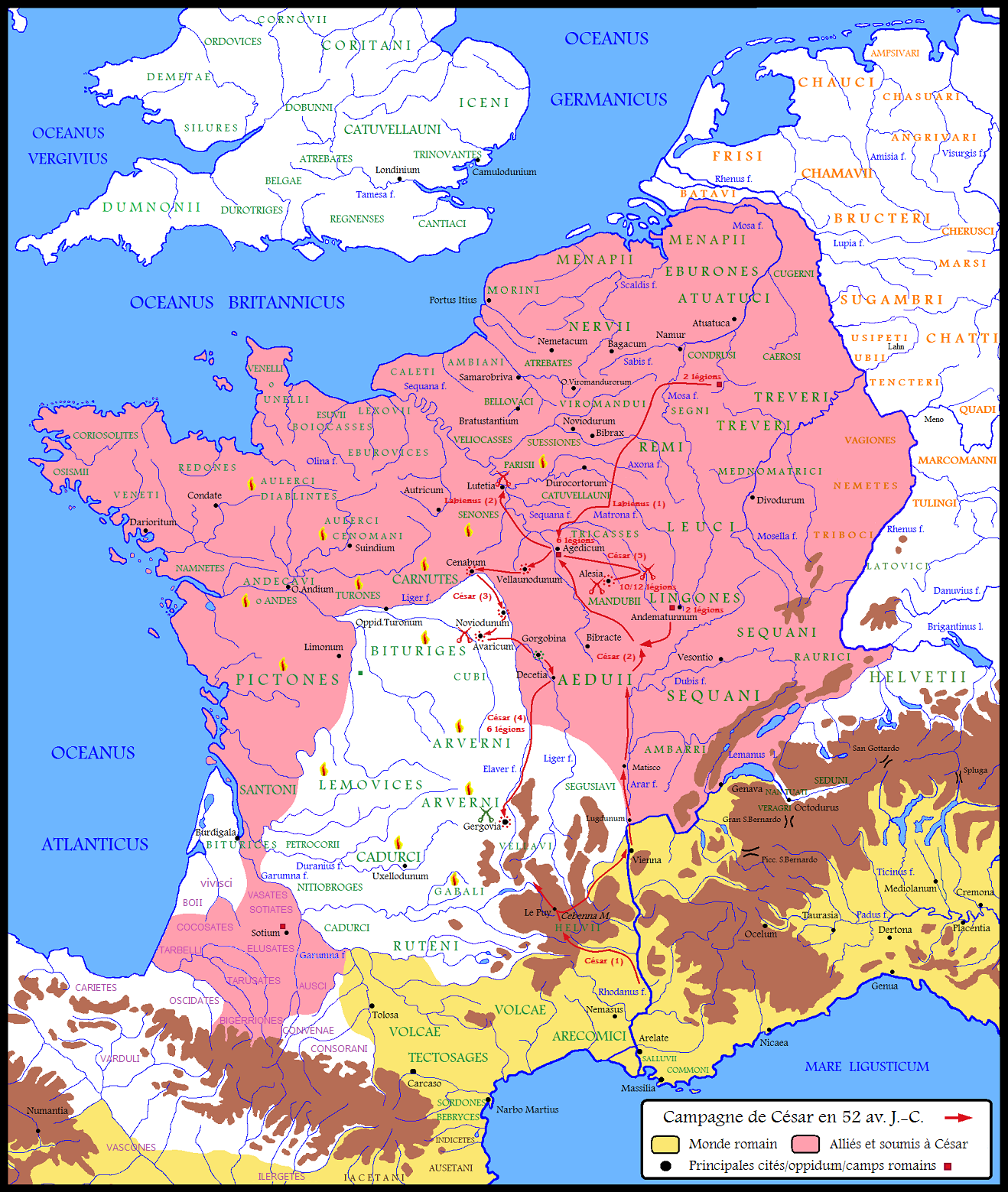 La Gaule en 52 av. J.-C. / Septième année de campagne de César